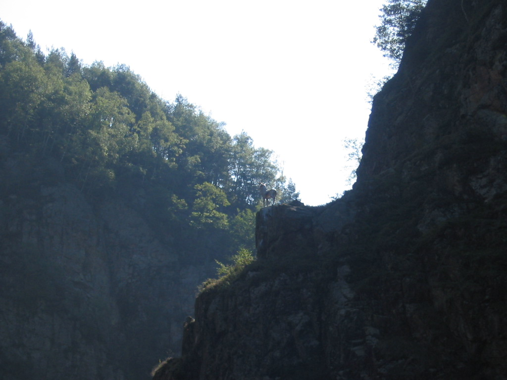 Hirschsprung